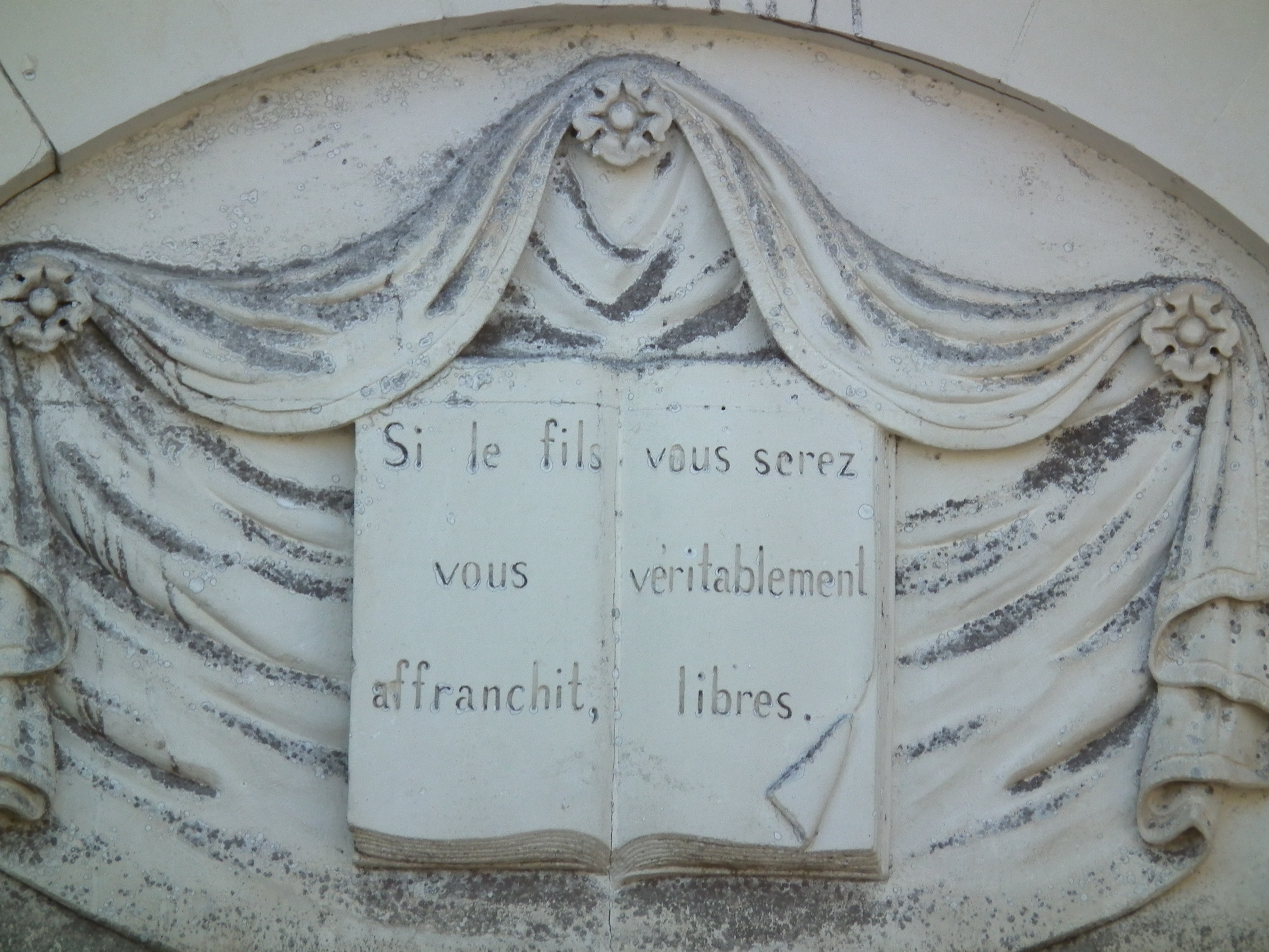 Tympan du temple d'Etaules